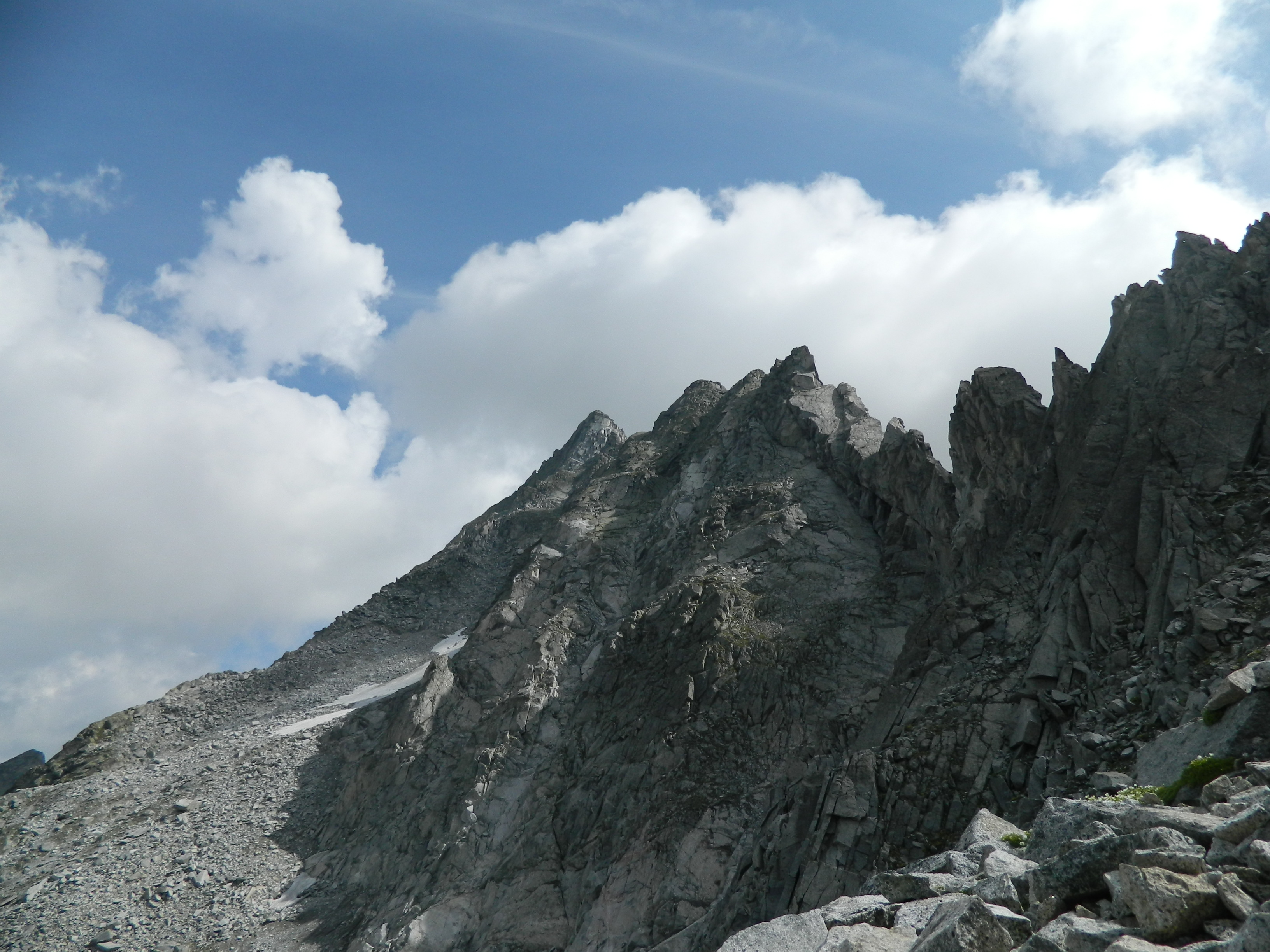 cima plem